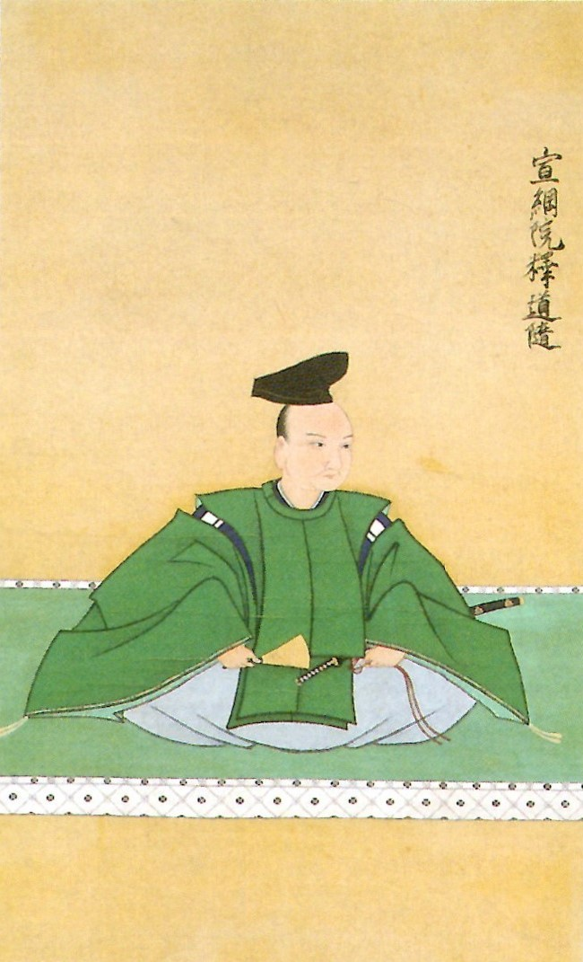 渡辺宣綱の肖像。